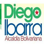 g